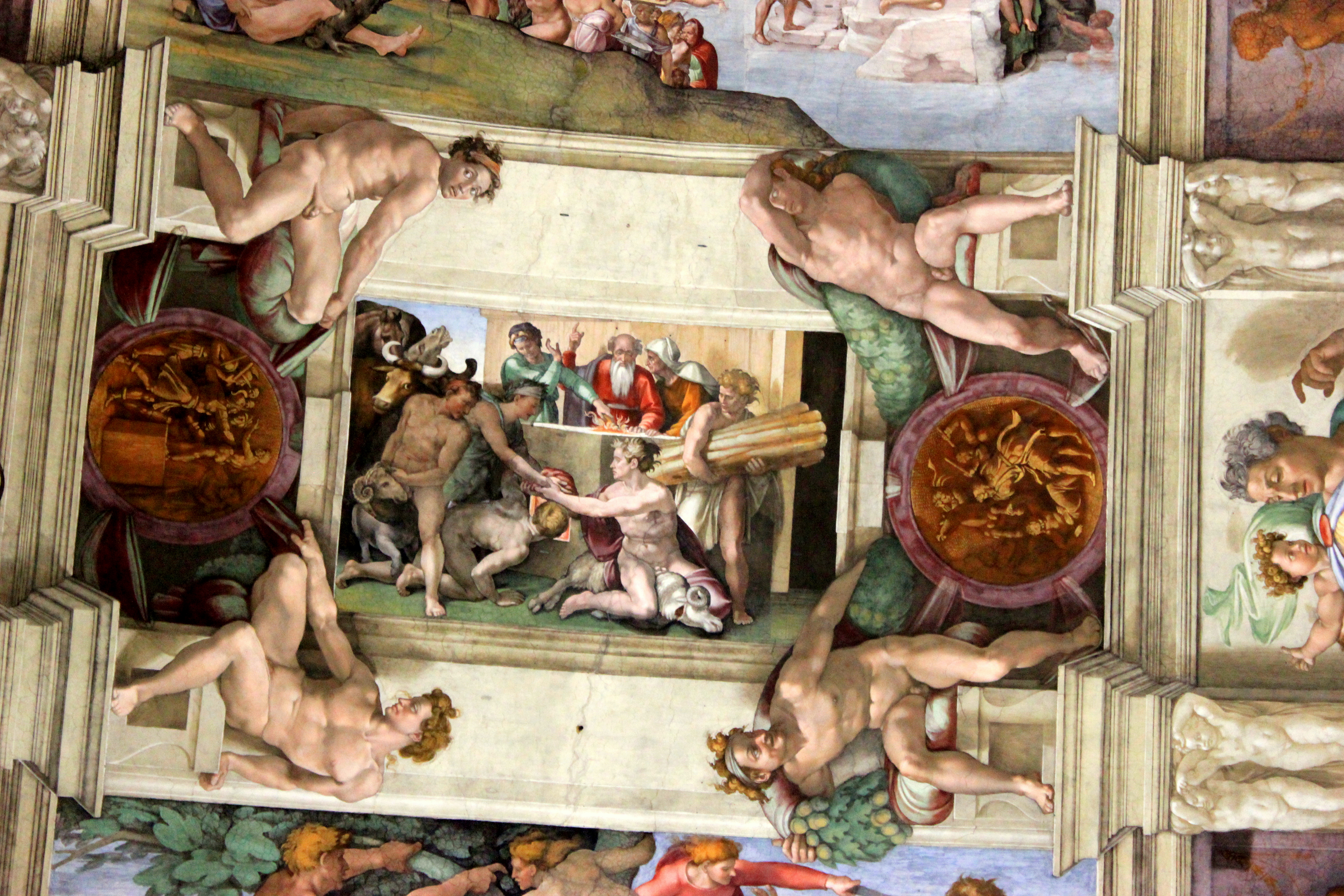 El sacrificio de Noé